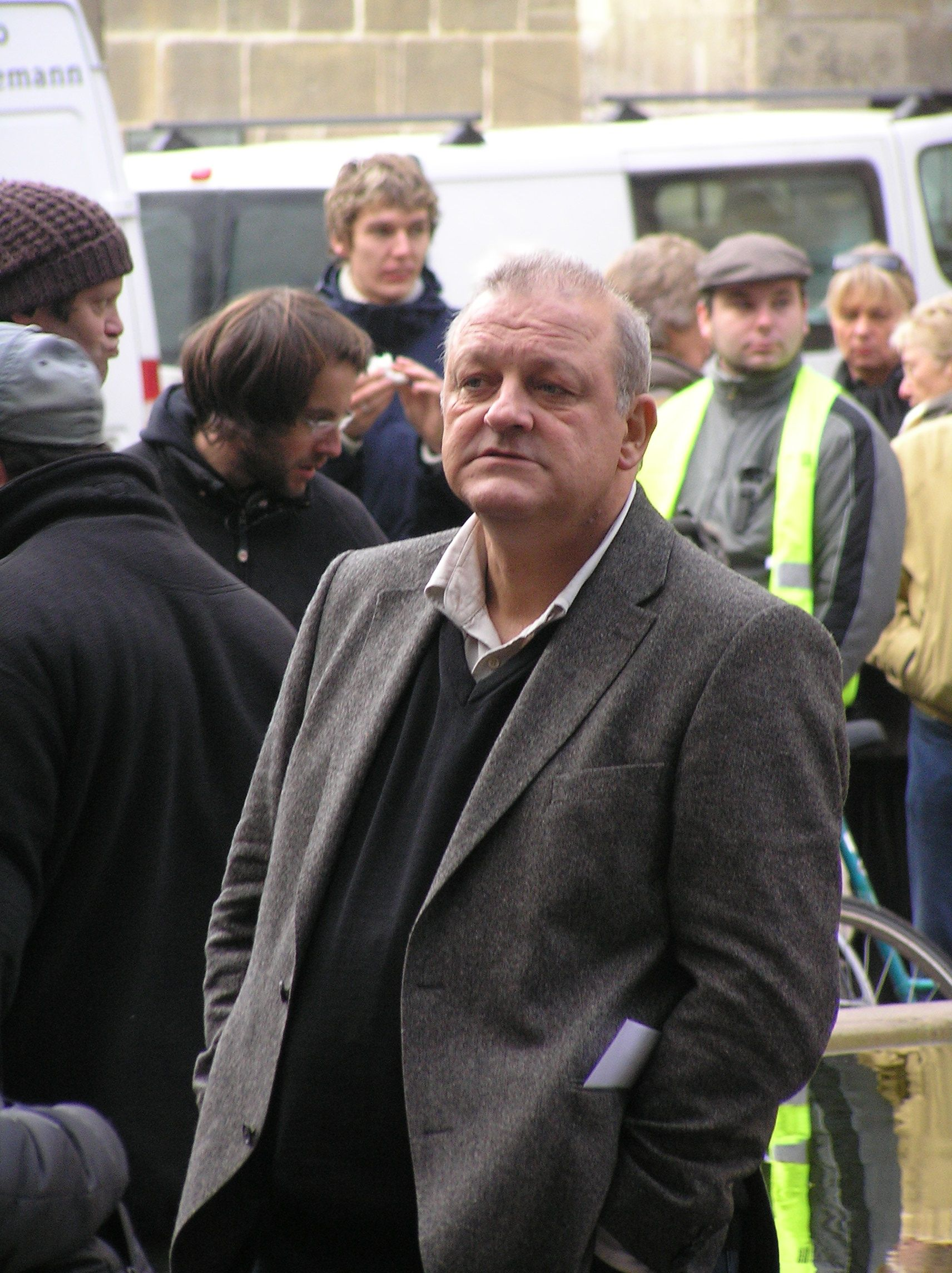 Leonard Lansink bei Dreharbeiten zu "Wilsberg" in Münster